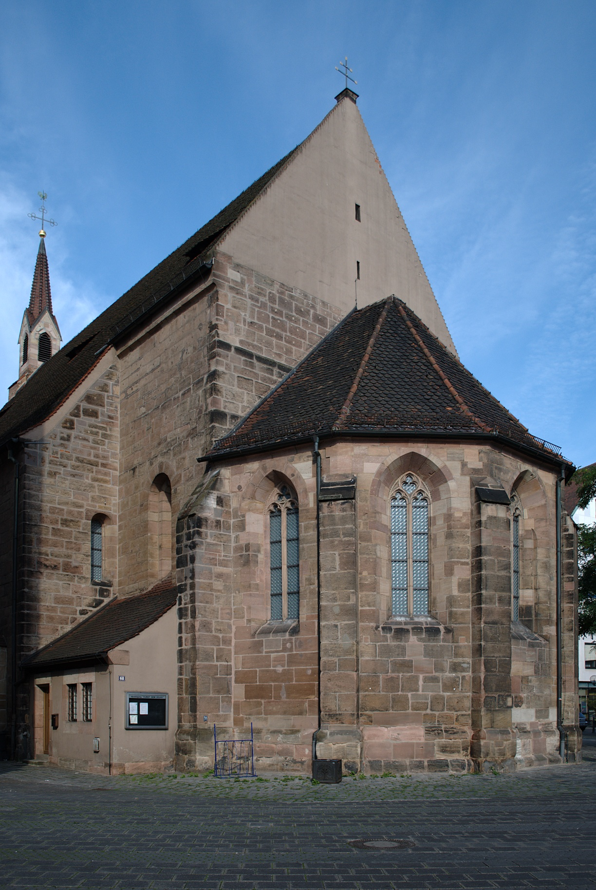 Die Klarakirche in Nürnberg von Südosten.